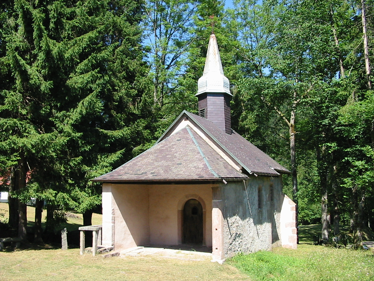 Chapelle Sainte-Anne près du col de Martimpré sur la commune de Gerbépal (Vosges).